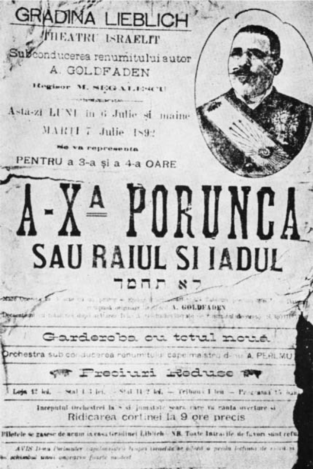 Romanian-language poster for the Abraham Goldfaden play A Xa poruncă sau Raiul şi Iadul at "Gradina Lieblich Theatru Isralit": The Tenth Commandment [Thou Shalt Not Covet] or Heaven and Hell at Lieblich Garden Israelite Theater. Partial transcription: GRADINA LIEBLICH THEATRU ISRAELIT Sub conducearea renumitului autor A. GOLDFADEN Regisor M. Segalescu Astă-zi LUNI în 6 Julie şi mâine MARŢI 7 Julie 1892 se va representa PENTRU a 3-a şi a 4-a OARE A Xa PORUNCA SAU RAIUL ŞI IADUL לא תחמד ... Mare Oper[illegible] [illegible] A. GOLDFADEN Dec[illegible] Garderoba cu totul nouă Orchestra sub conducerea renumitului Capelmaistru D[-nu] A. PERLMU[missing, presumably "TER"] Preciuri reduse Loja - 12 lei — Stal I - 3 lei — Stal II - 2 lei — Tribună - 1 leu — P[illegible] - 15 bani Inceputul Orchestrei la [illegible, presumably 8] şi jumatate Seara care va [illegible]la overture şi Ridicarea cortenei la 9 ore precis Biletile se gasesc de acum la Casa Liblich N.B. Toate Intr[illegible]ile de favori sunt refu[missing] AVIS: D-nu Perlmuter capelmaistro [illegible] [illegible] schimbul unul onorarie foarte[illegible]